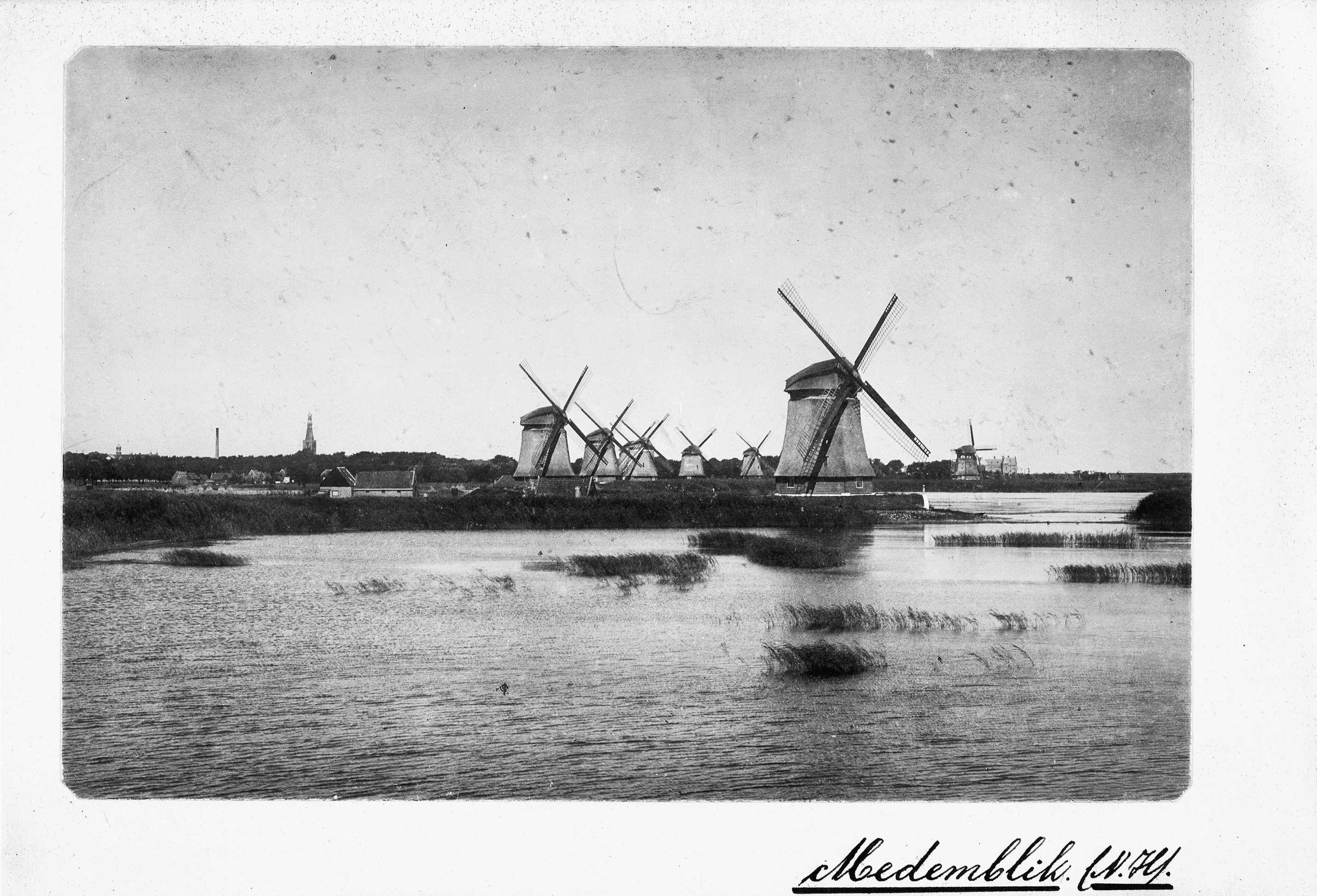 Diversen: molens waterschap De Vier Noorder Koggen, overzicht